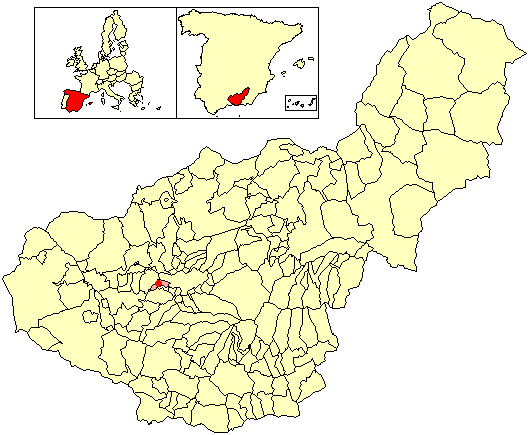 Situación de la localidad de Belicena (en el municipio de Vegas del Genil) respecto a la provincia de Granada, en España.